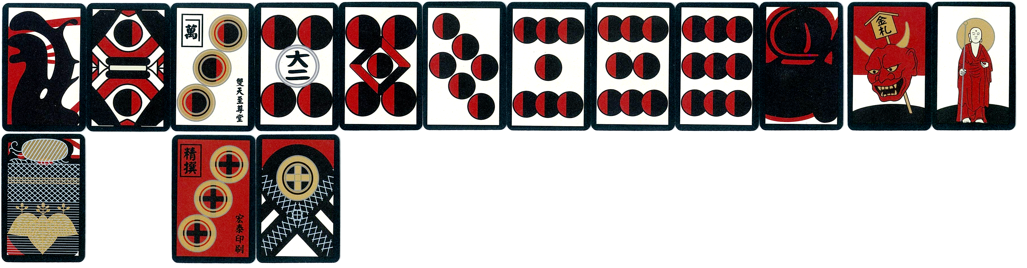 中文（台灣）: 大二札牌具